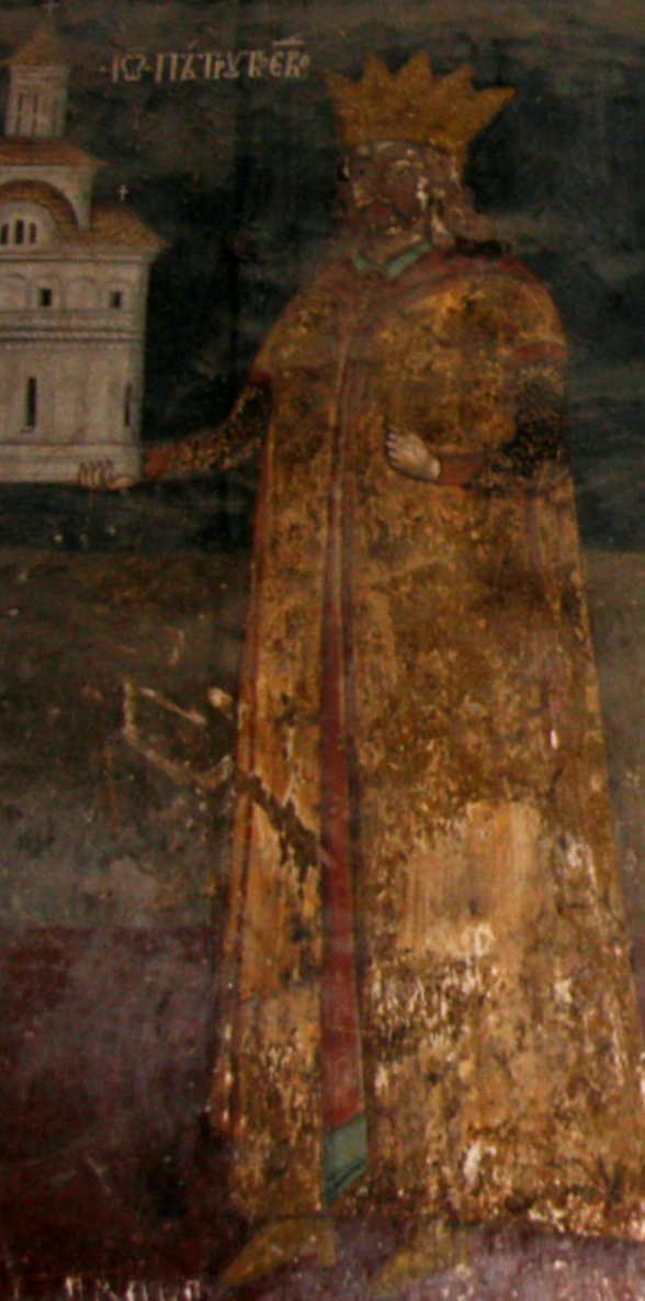 Petru Cercel